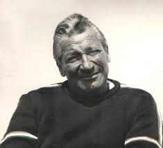 Edmondo Savelli (1916-2008)